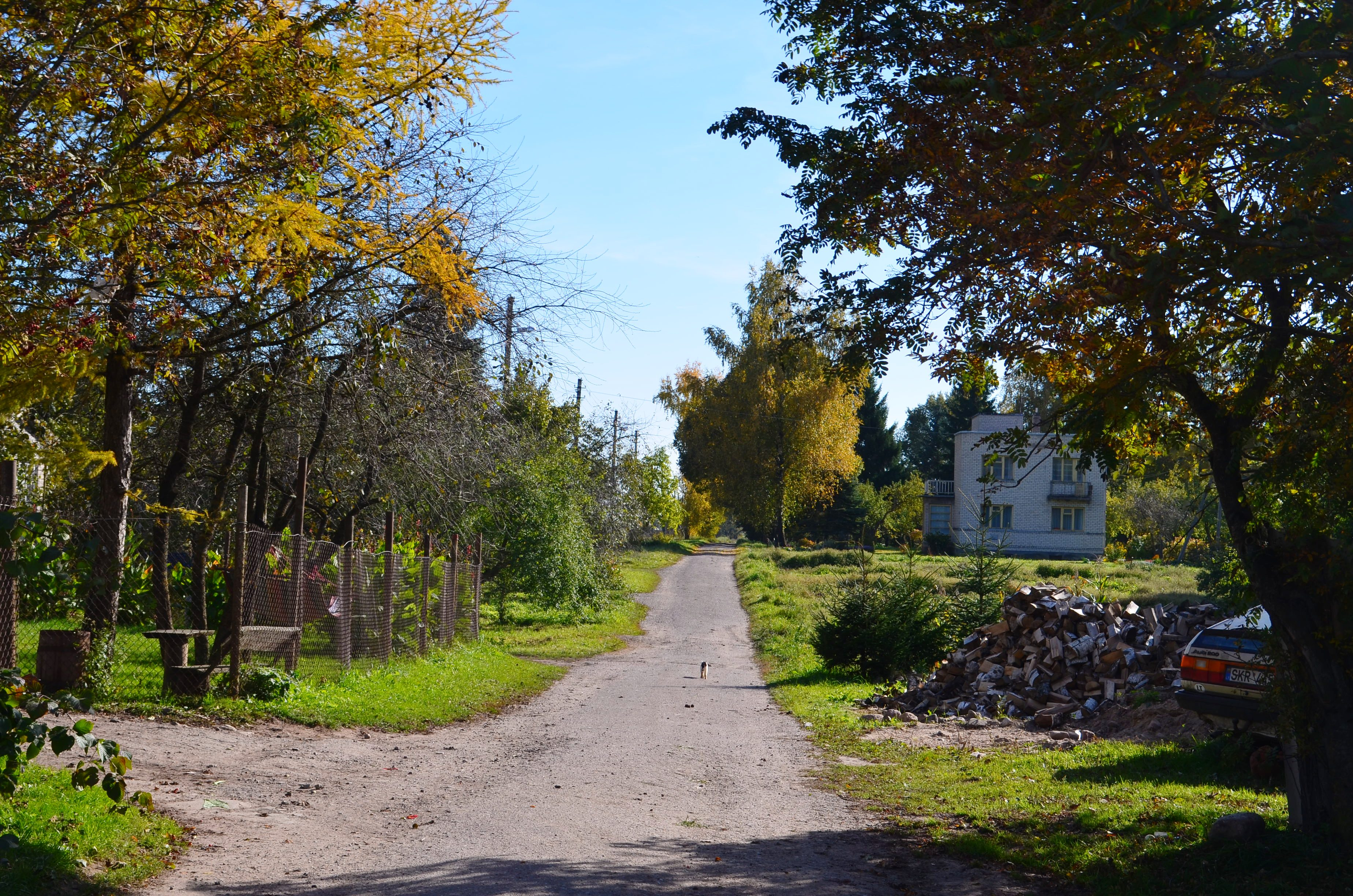 Jaunakaimis, Gudžiūnų sen., Kėdainių raj.